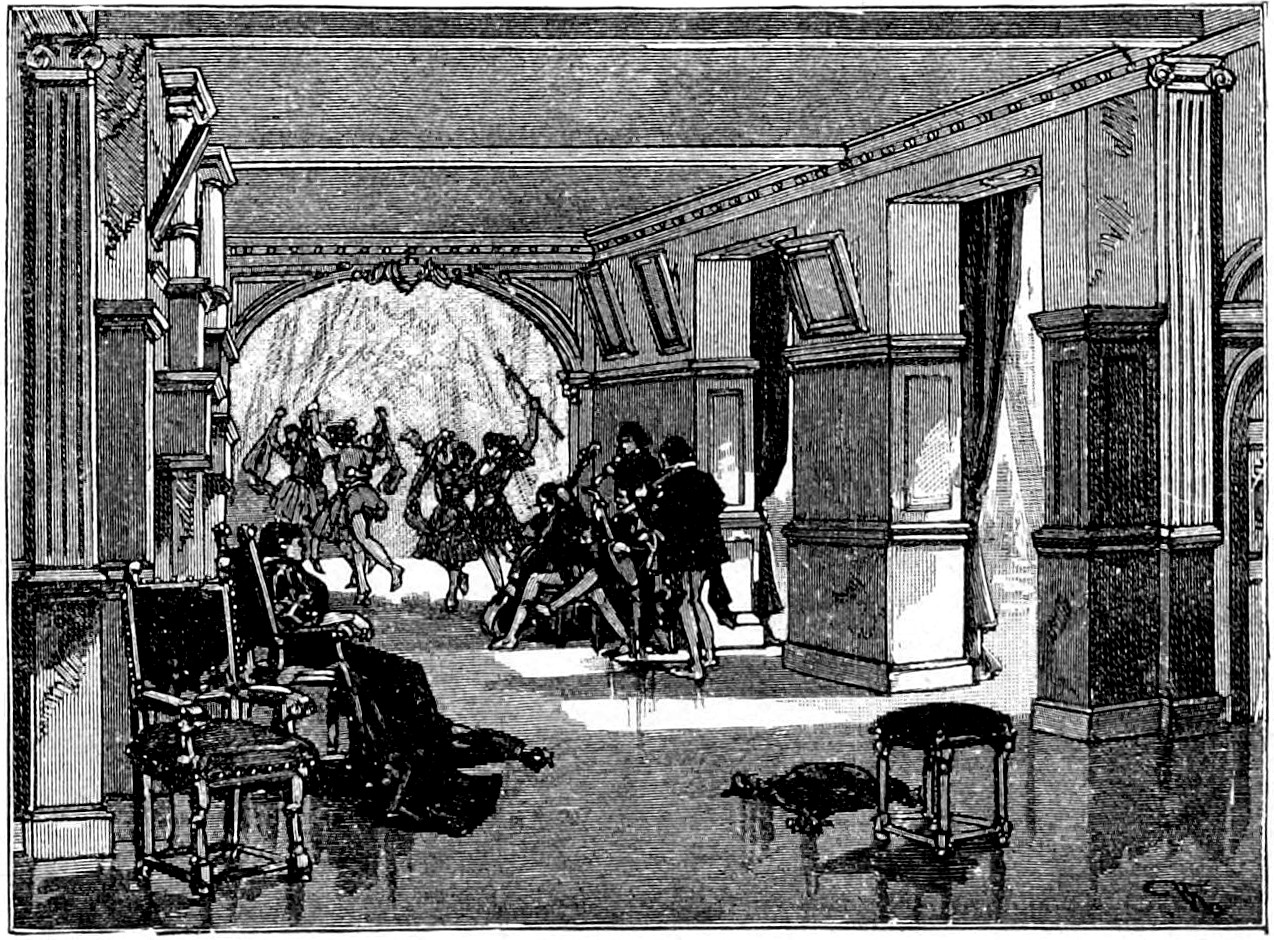 Saint-Saëns - Henry VIII - Illustrations de presse 1903 - 4e acte - Un appartement chez la reine Anne